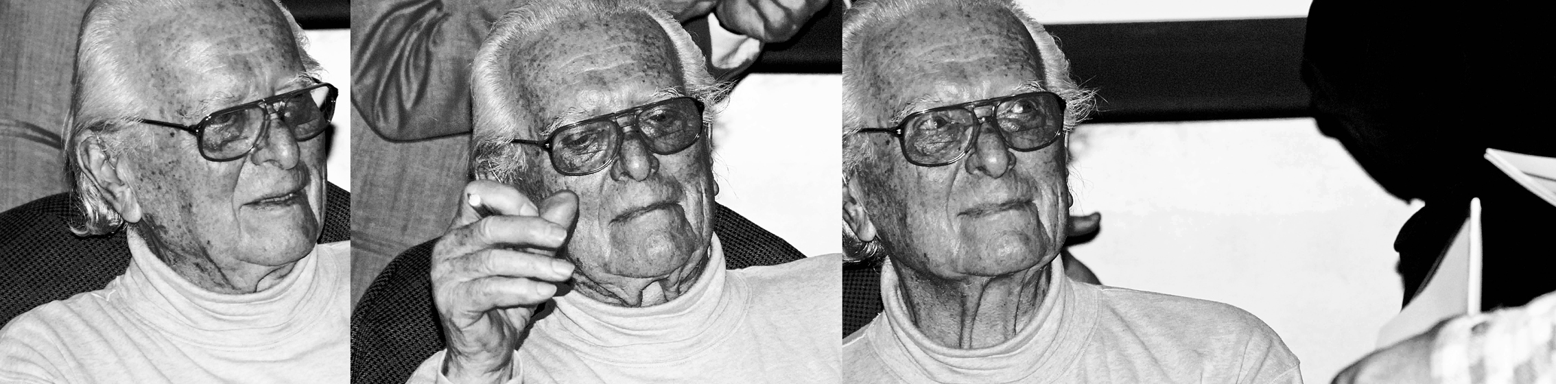 Ernst von Glasersfeld in Wien